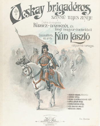 "Ocskay brigadéros" - történelmi színmű 4 felvonásban. Bemutató: 1901. febr. 8. Vígszínház Az itchingen szereplő 10/10.8 szám, vélhetően a felvétel napjára utal.